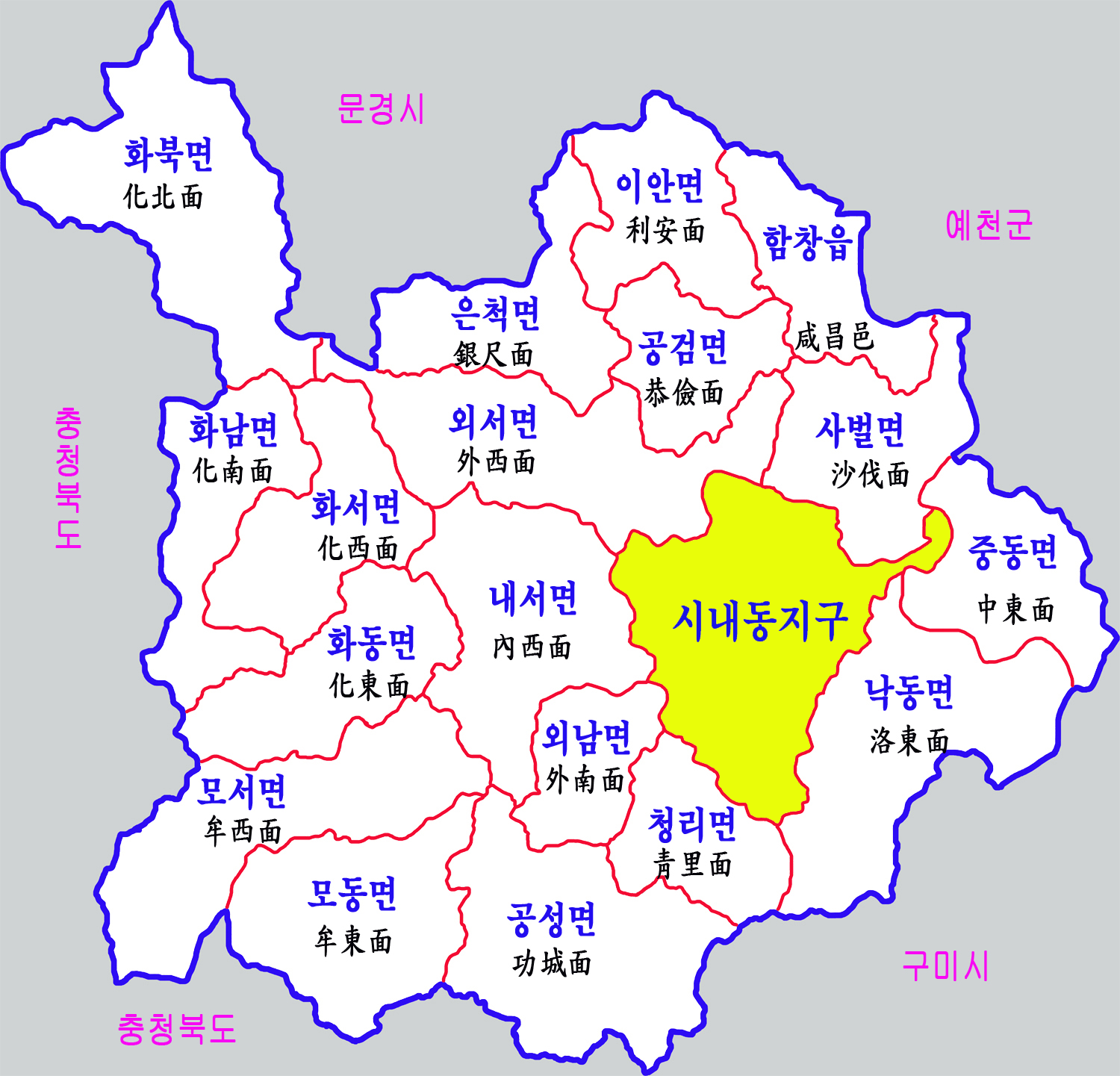 상주시 행정구역도